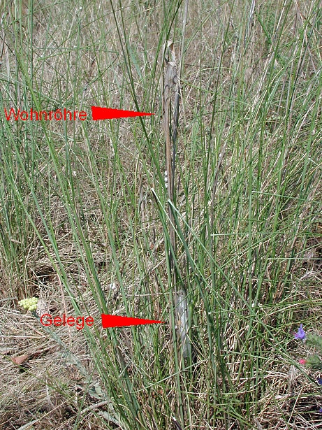 Dornfinger, Cheiracanthium punctorium, Darmstadt, Deutschland (Germany)